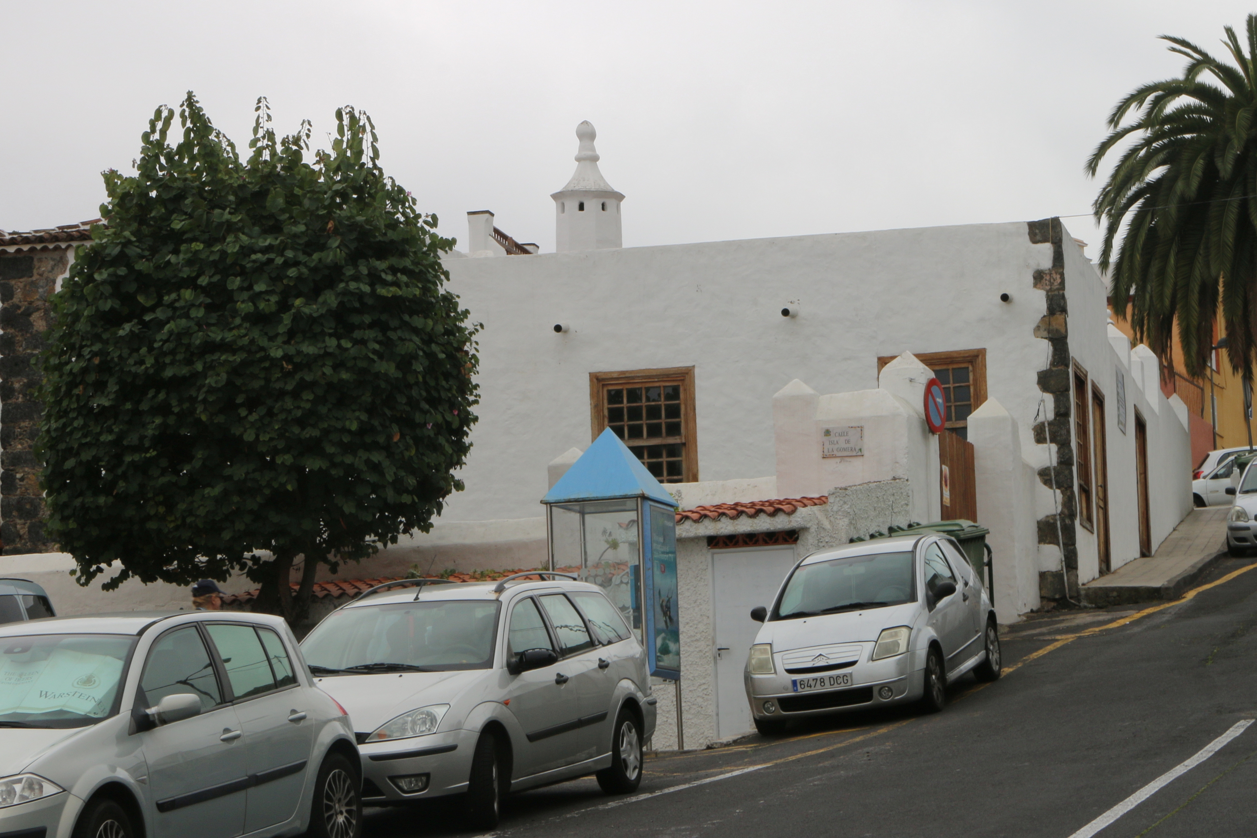 Icod de los Vinos, Teneriffa: Casa Campino